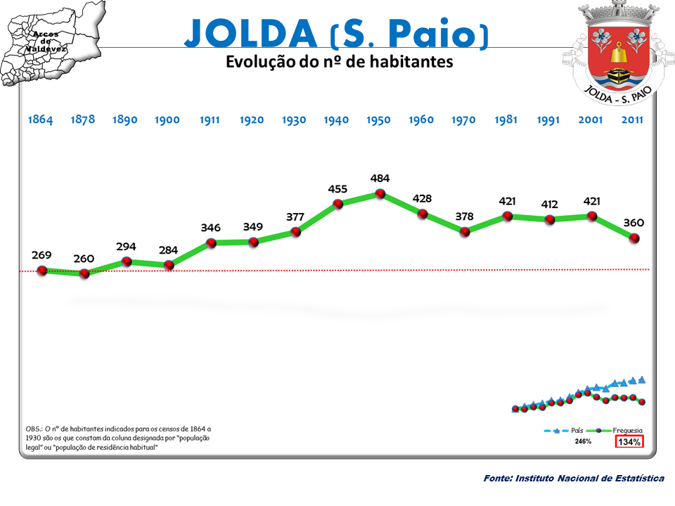 Censos 1864/2011